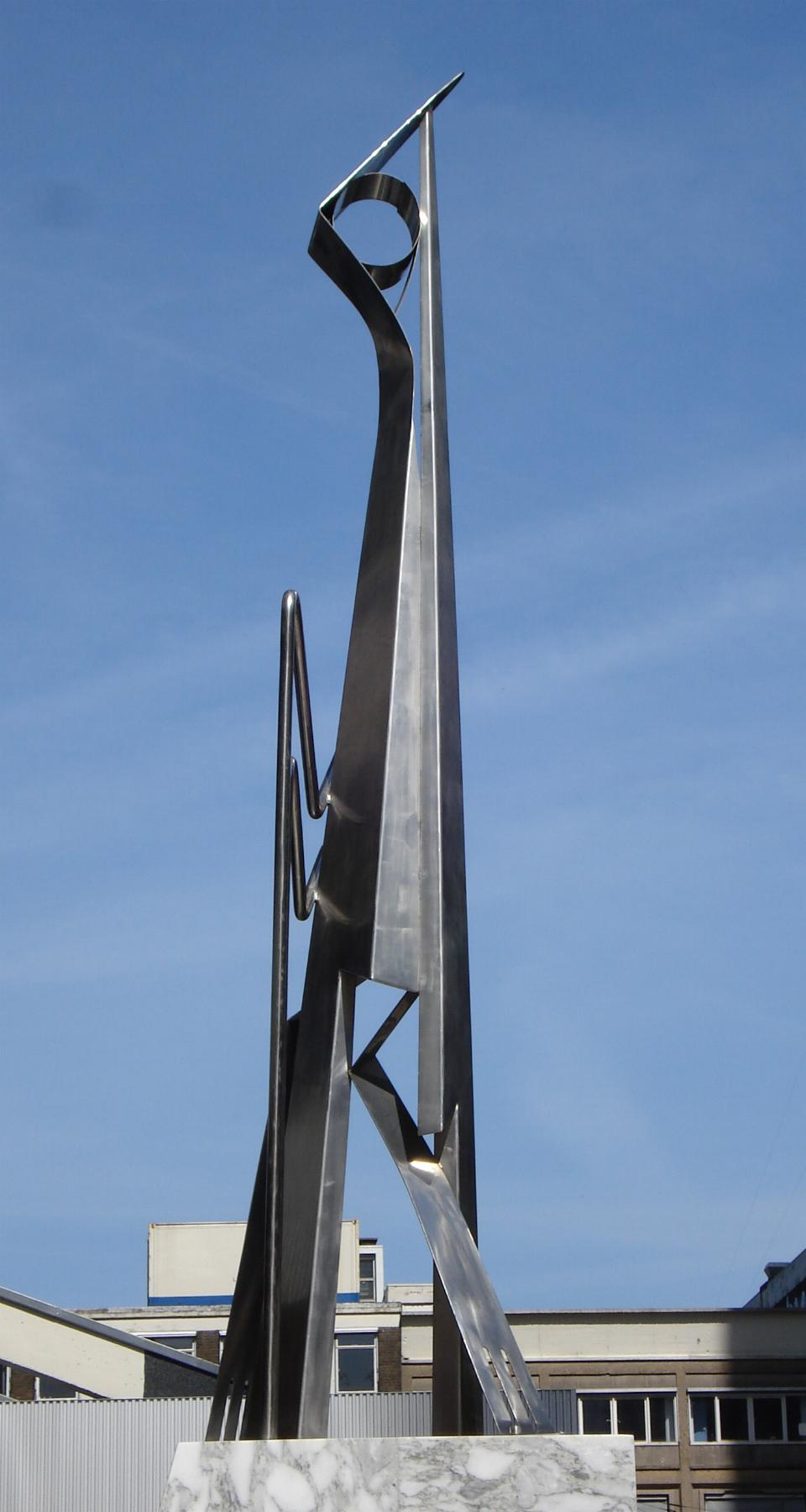 Rotterdam, Delftseplein, naast centraal station (tot 2010: Gedempte Zalmhaven). Kunstwerk. Phoenix van Kees Timmer. Rotterdam/The Netherlands